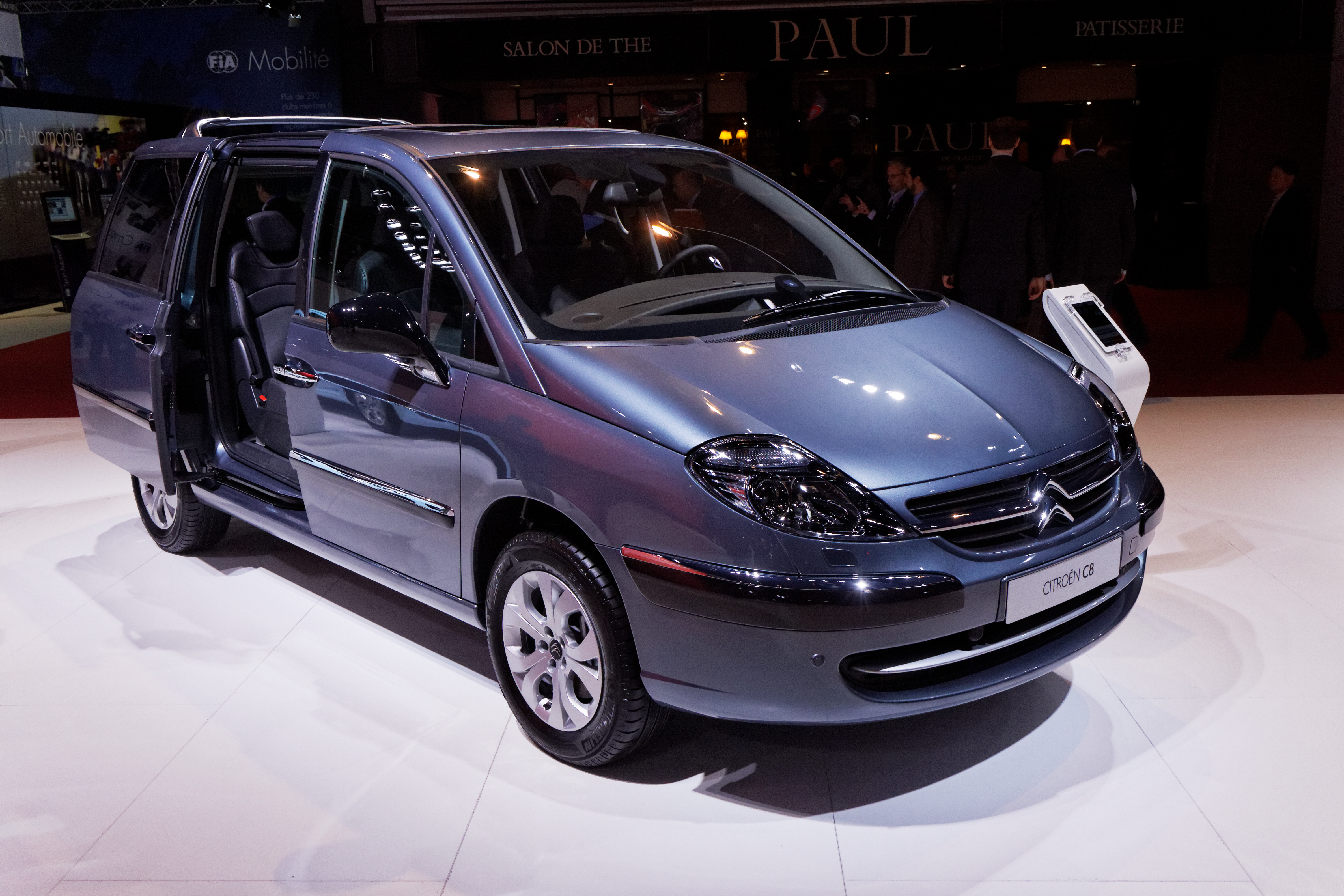 Une Citroën C8 présentée lors du Mondial de l'Automobile de Paris 2012.